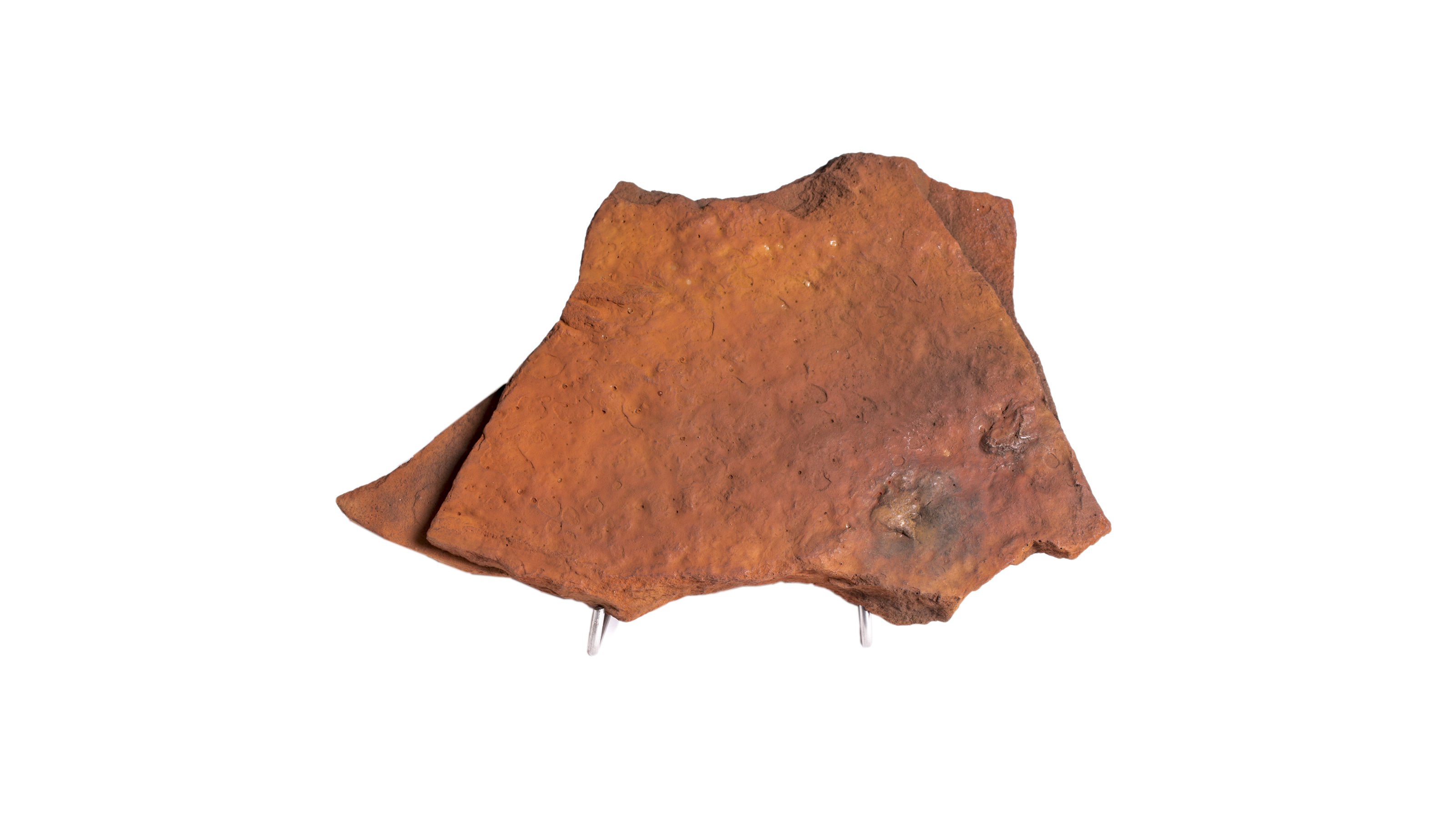 Orma di piccolo rettile.